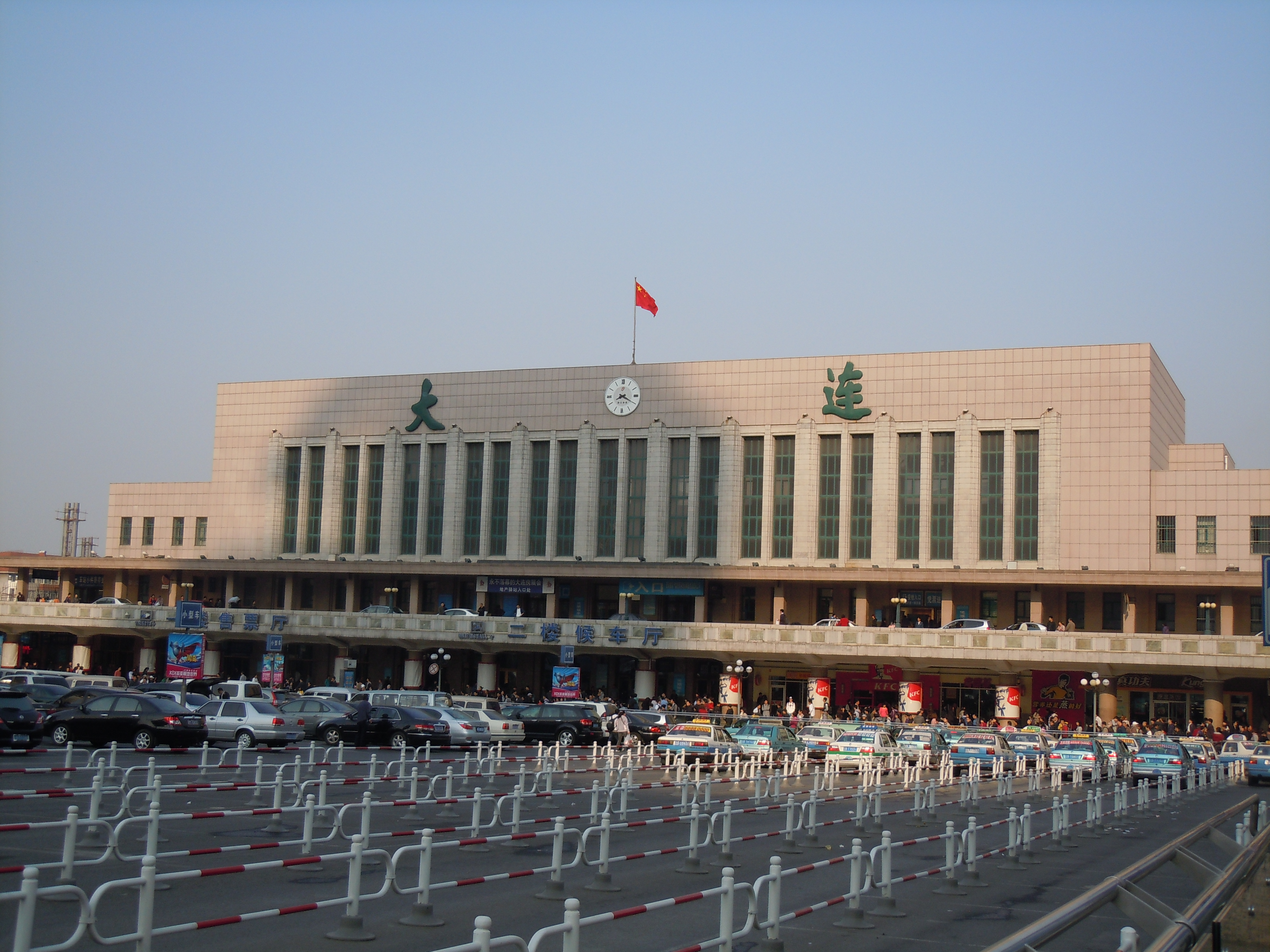 大连站外景，摄于车站南广场